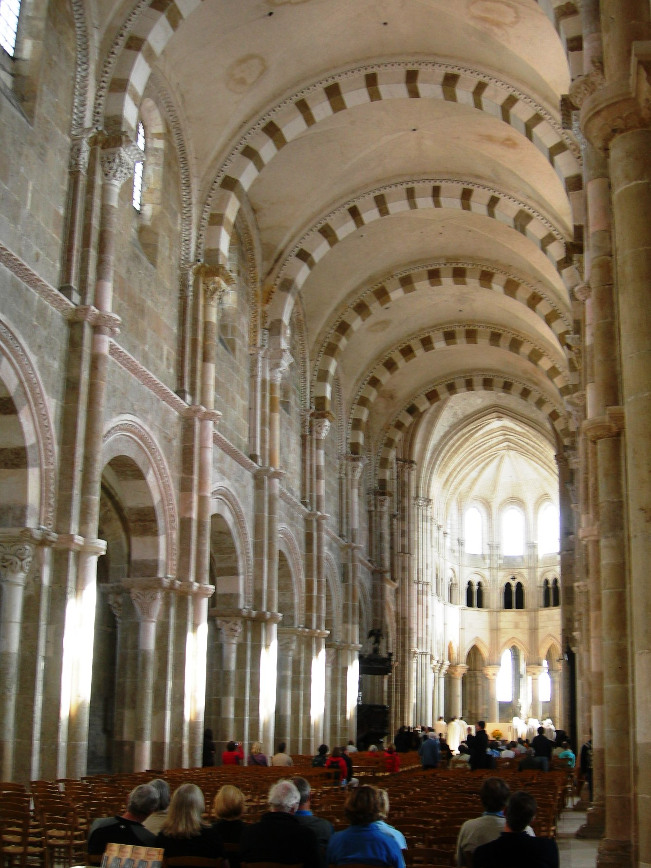 Ste Madeleine nave, interior.)